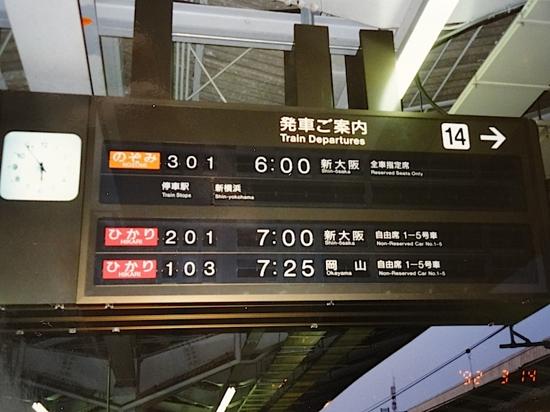 のぞみ301号（下り一番列車）の発車案内表示 （1992年3月14日撮影、東京駅）